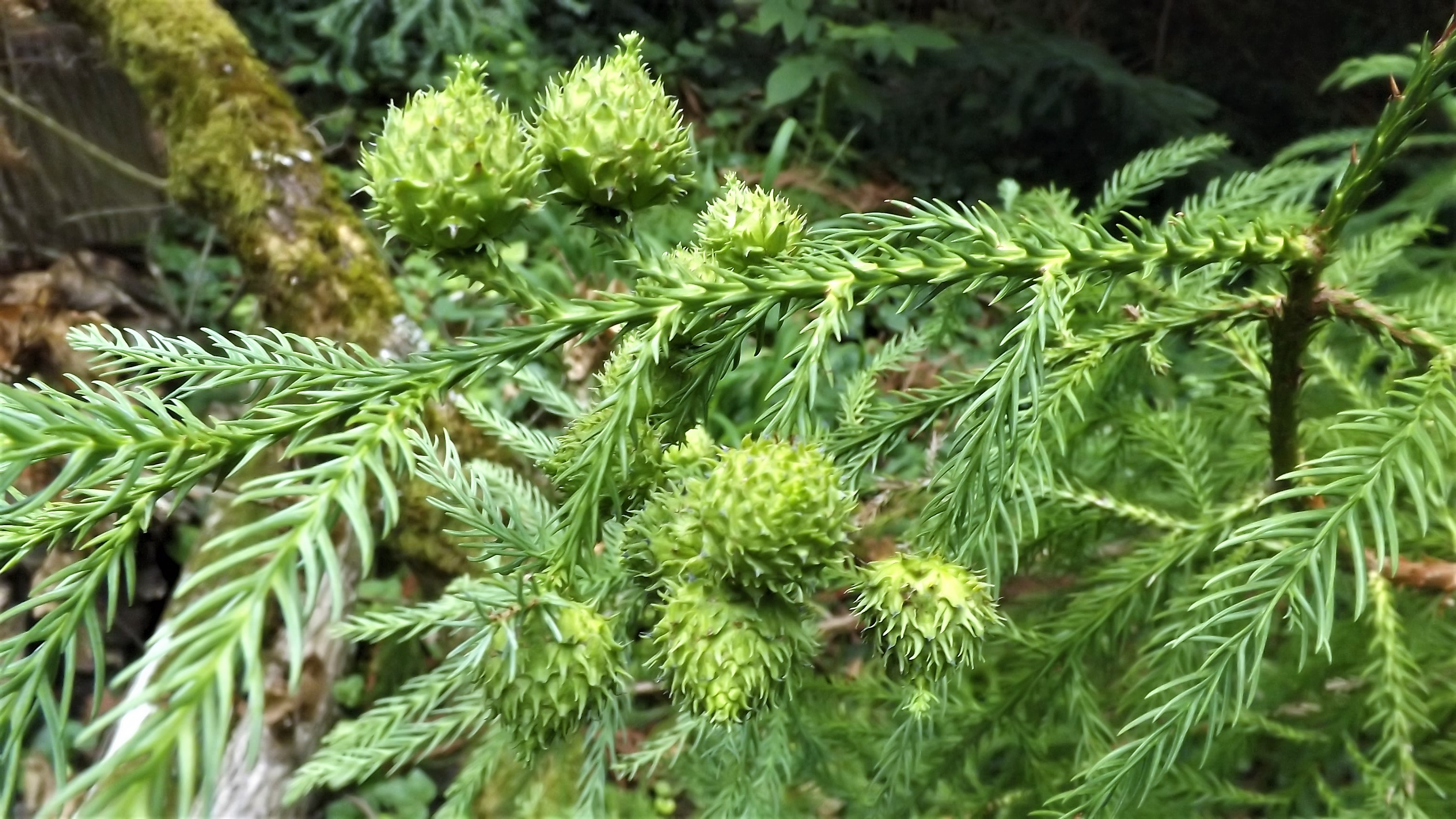 Vácrátóti botanikuskert